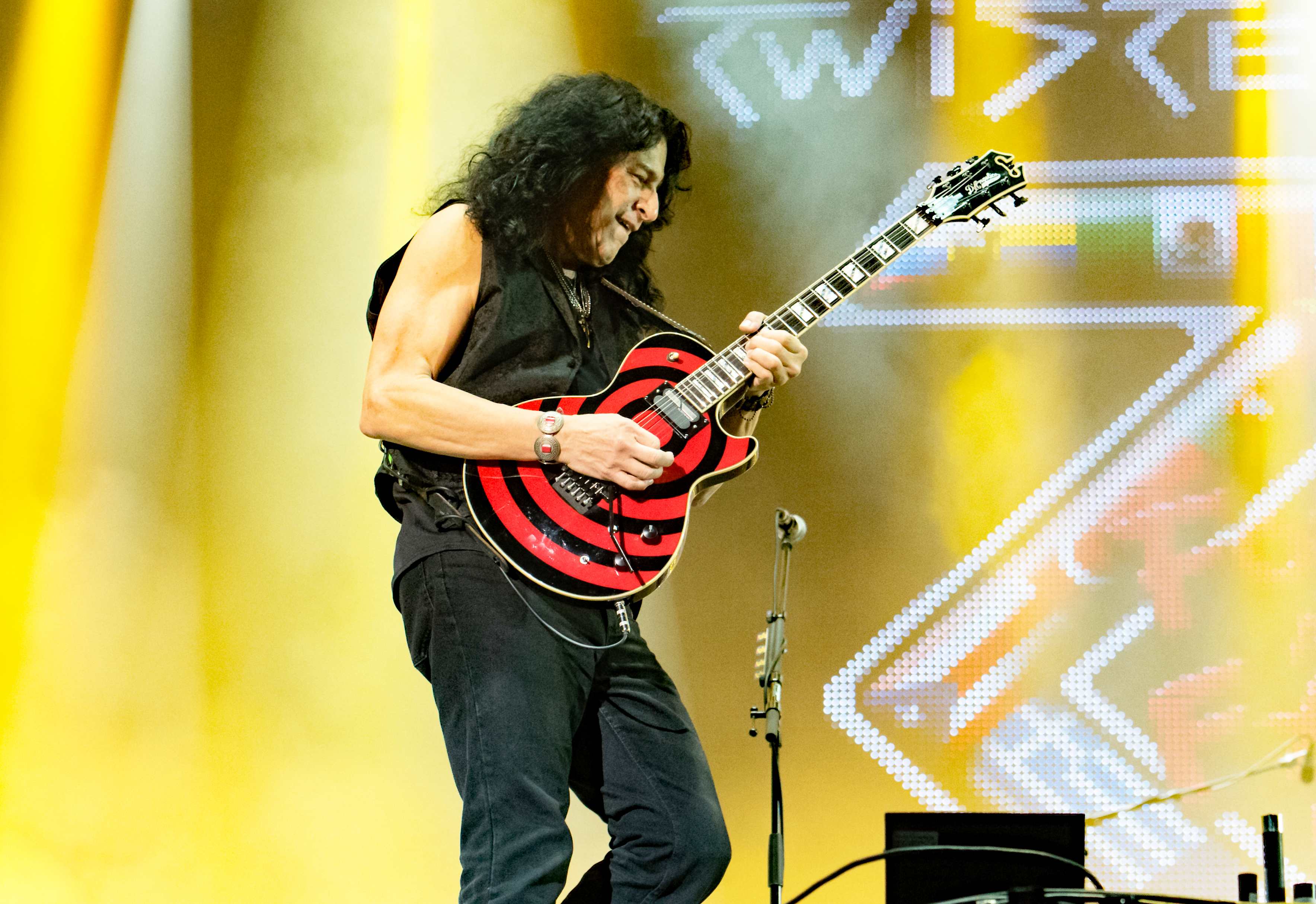 Twisted Sister beim Wacken Open Air 2016